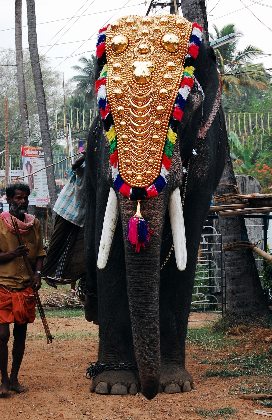 നെറ്റിപ്പട്ടം കെട്ടിയ ആന